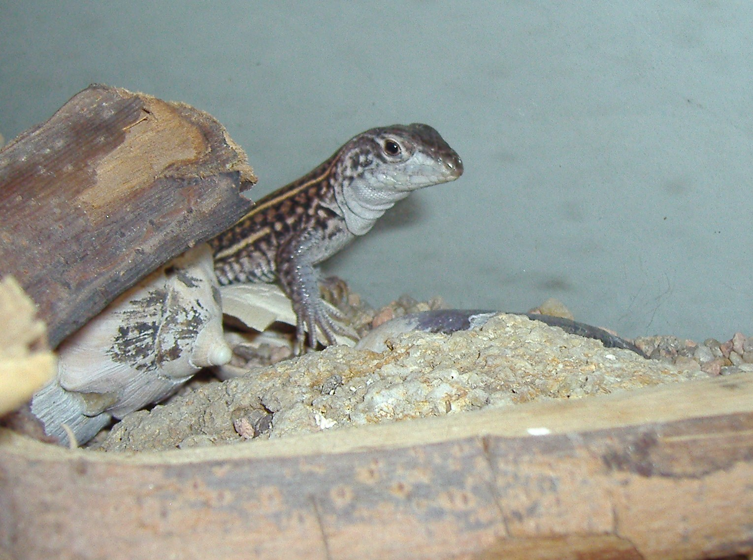 Teius Teyou hembra